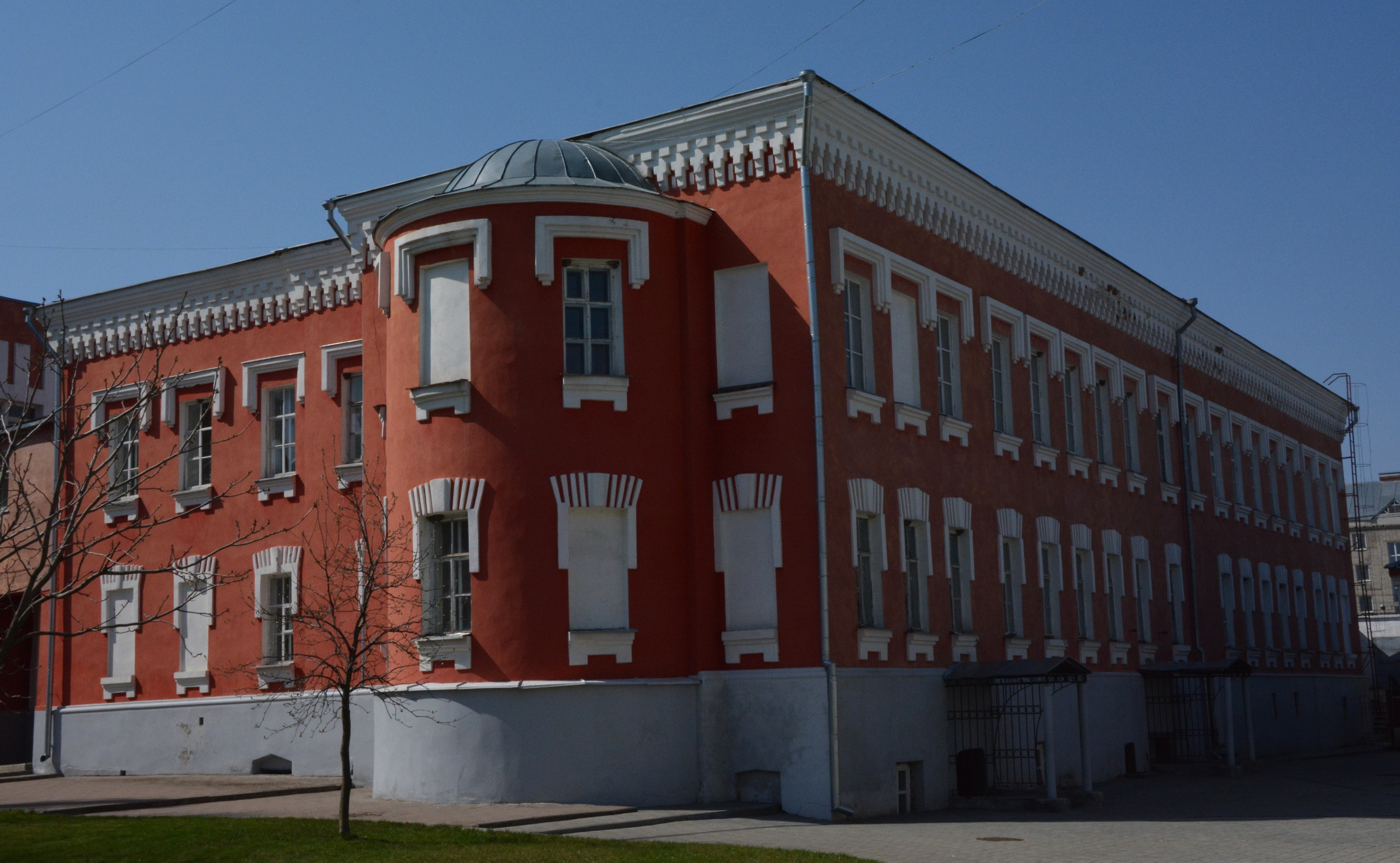 Пансіон Глухівської чоловічої гімназії, Глухів, вул. Києво-Московська, 24